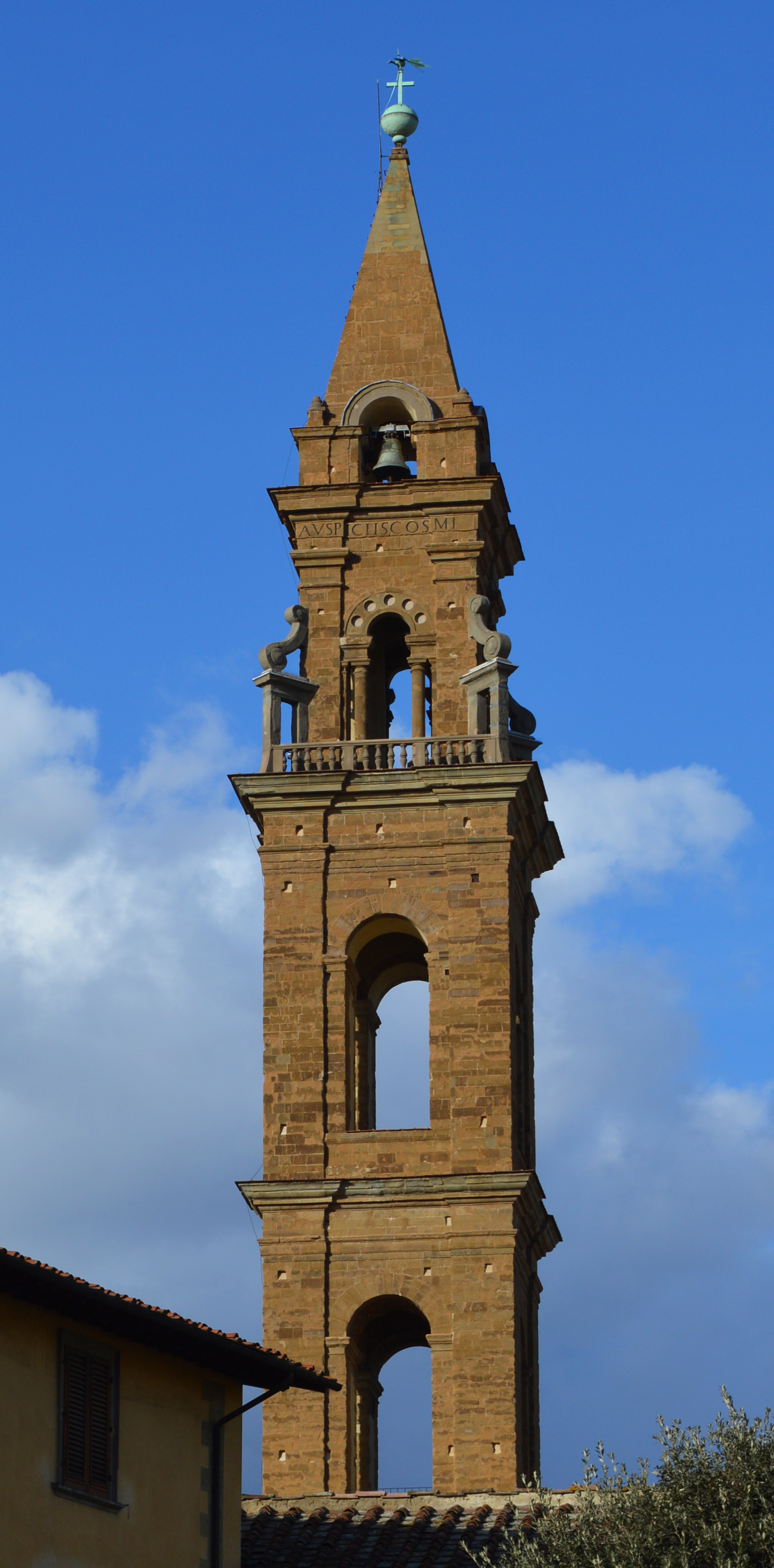 Veduta del campanile da piazza Santo Spirito.